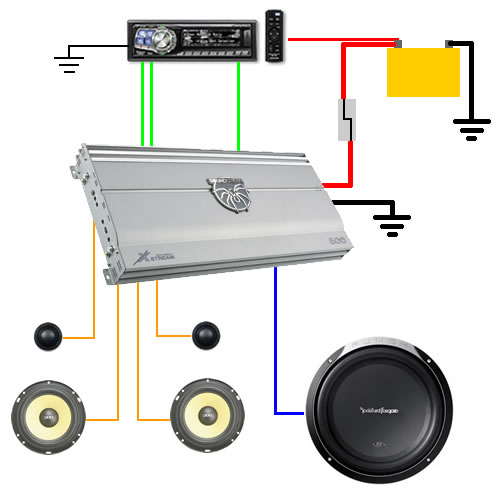 Illustration eines Car-HiFi-Systems